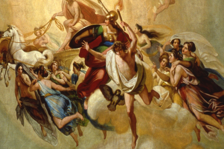 affresco sul soffitto del Salone Maria Luigia della Biblioteca Palatina di Parma.